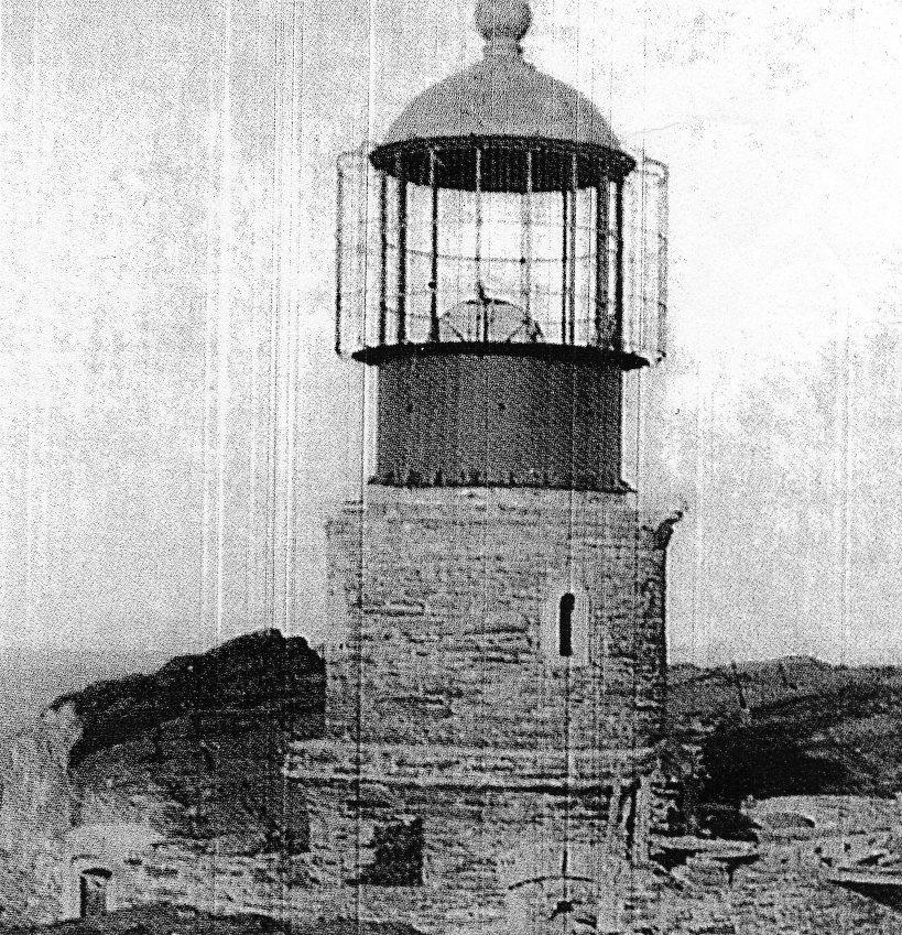 Faro Evangelistas en 1896